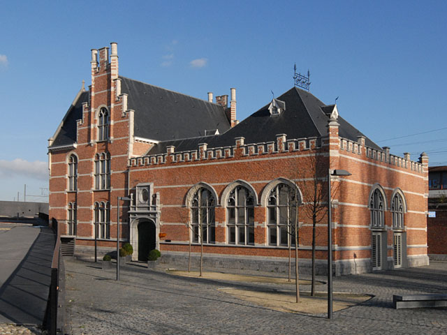 het station Antwerpen-Dam in het noorden van Antwerpen